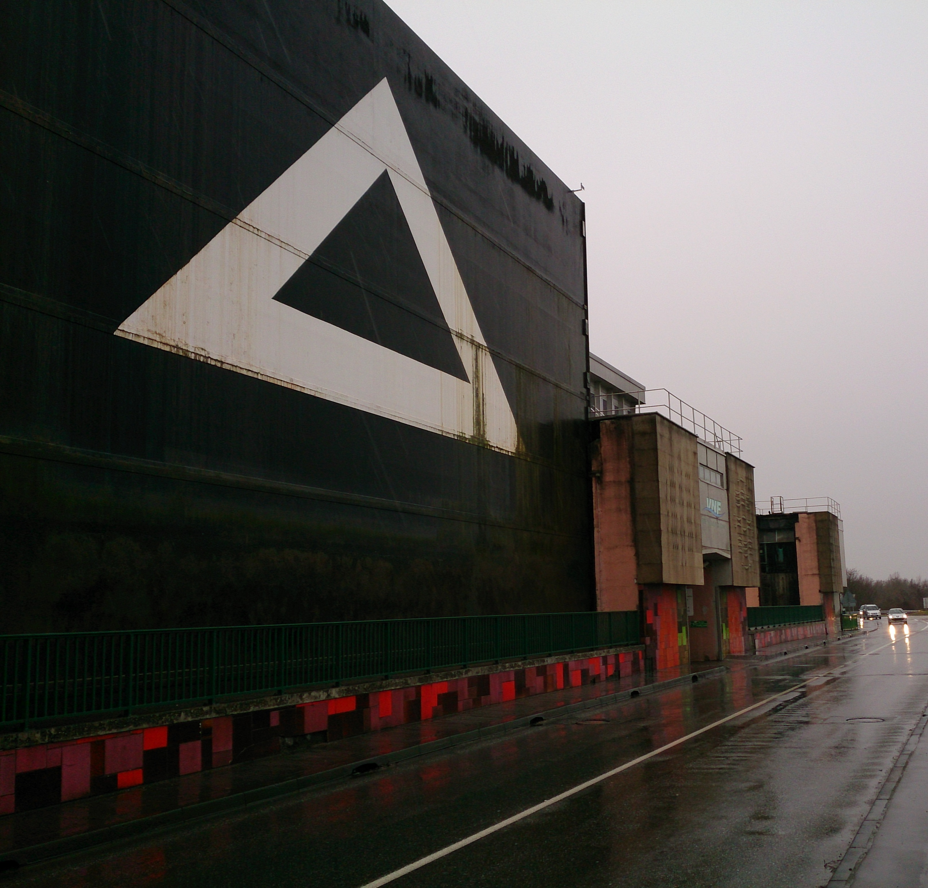 Geöffnetes Schleusentor an der Staustufe Rheinau-Gambsheim